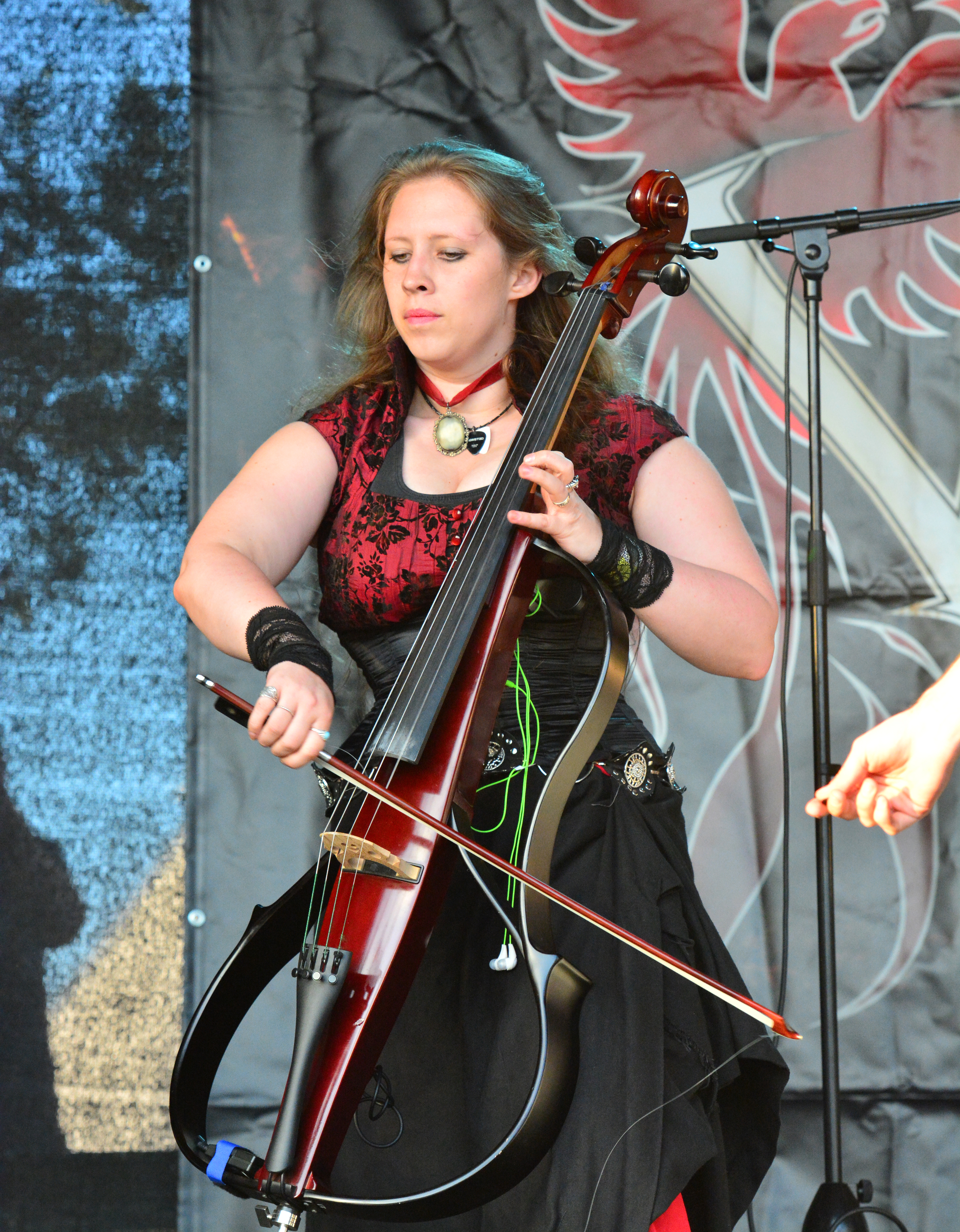 Vogelfrey beim Wacken Open Air 2014